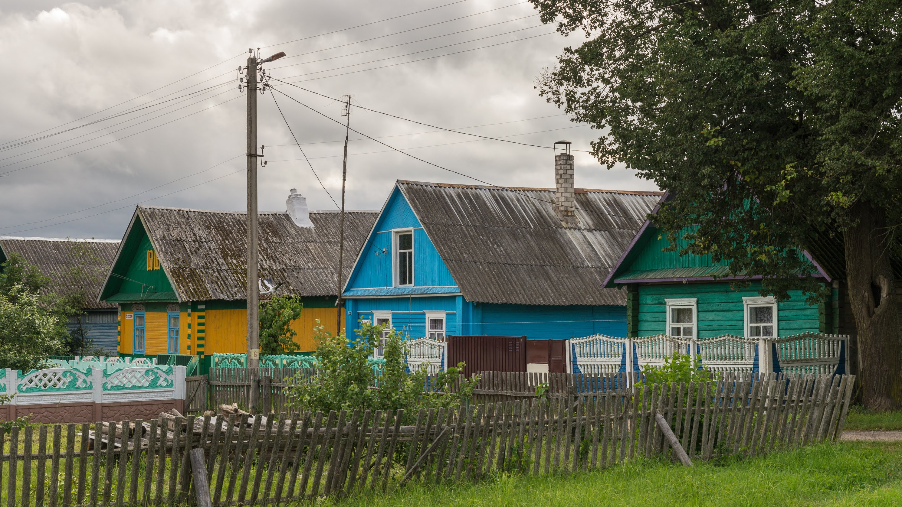 Забудова вёскі Камена